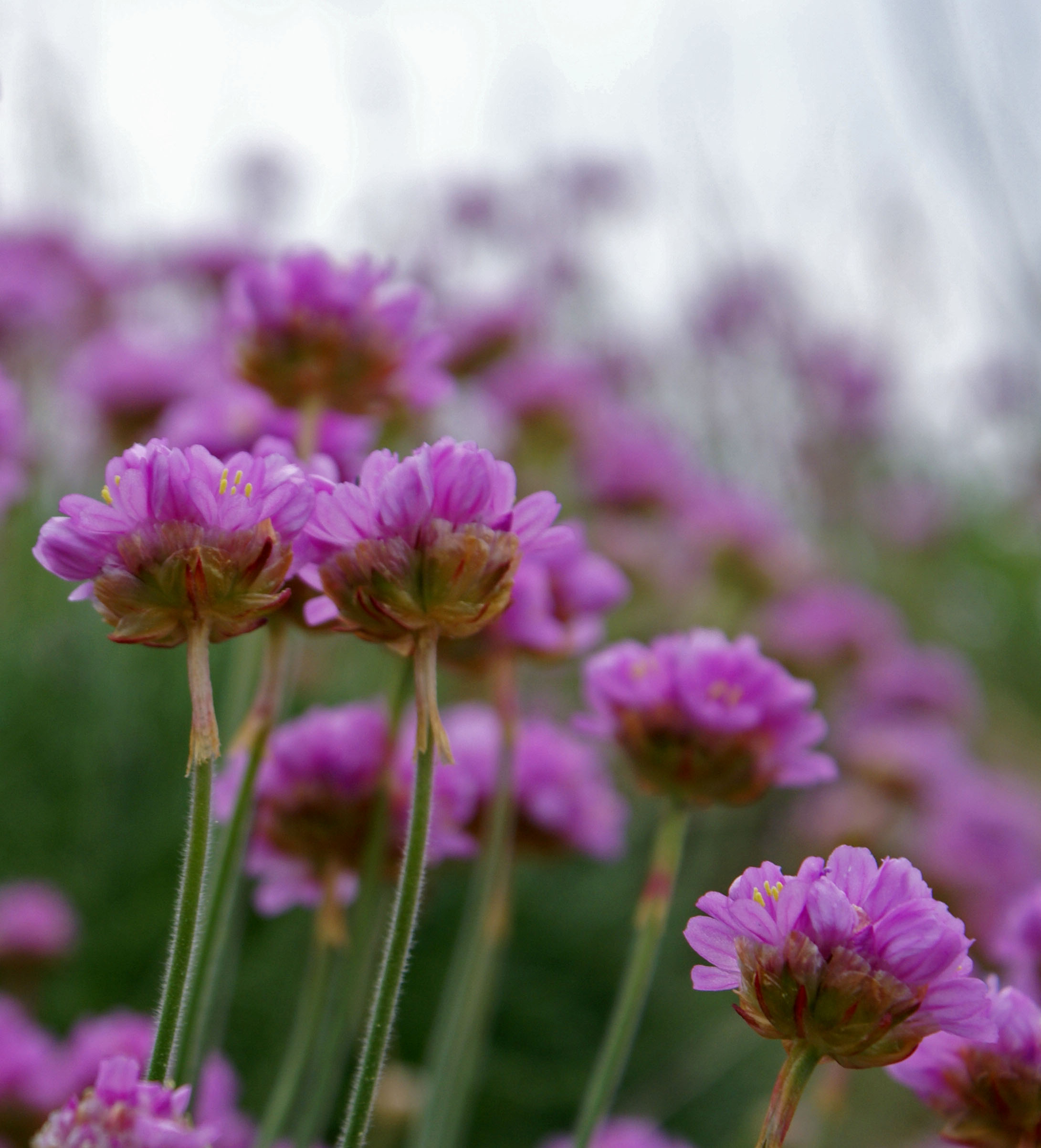 Thrift